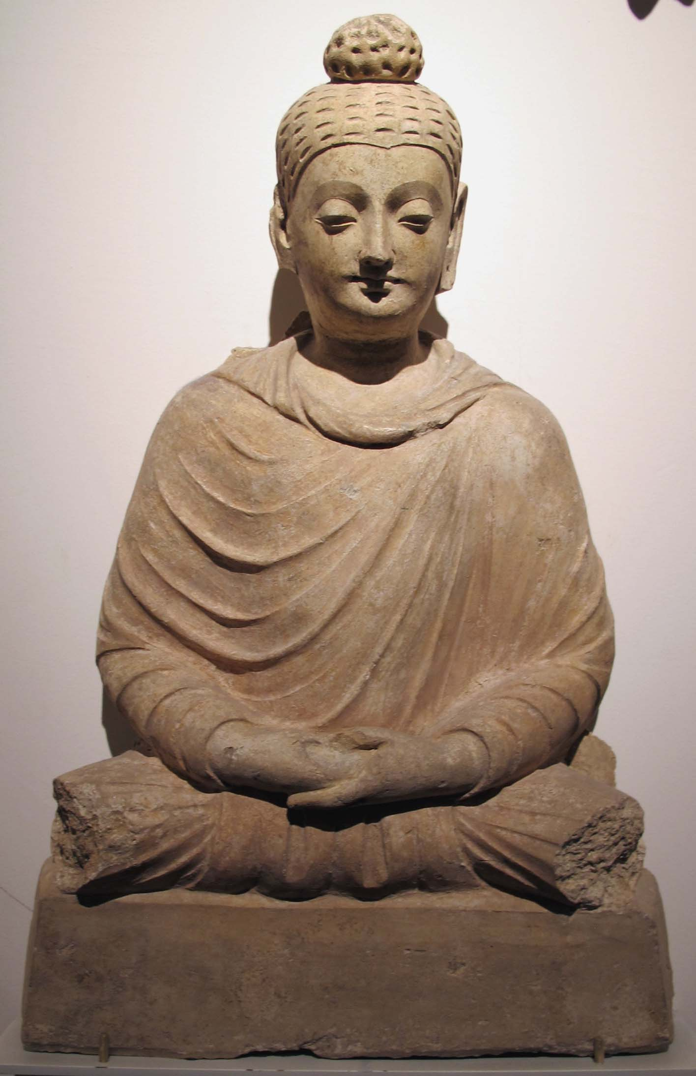 Afghanistan, buddha assiso, sito di hadda, monastero di tapa-kalan, III-IV sec